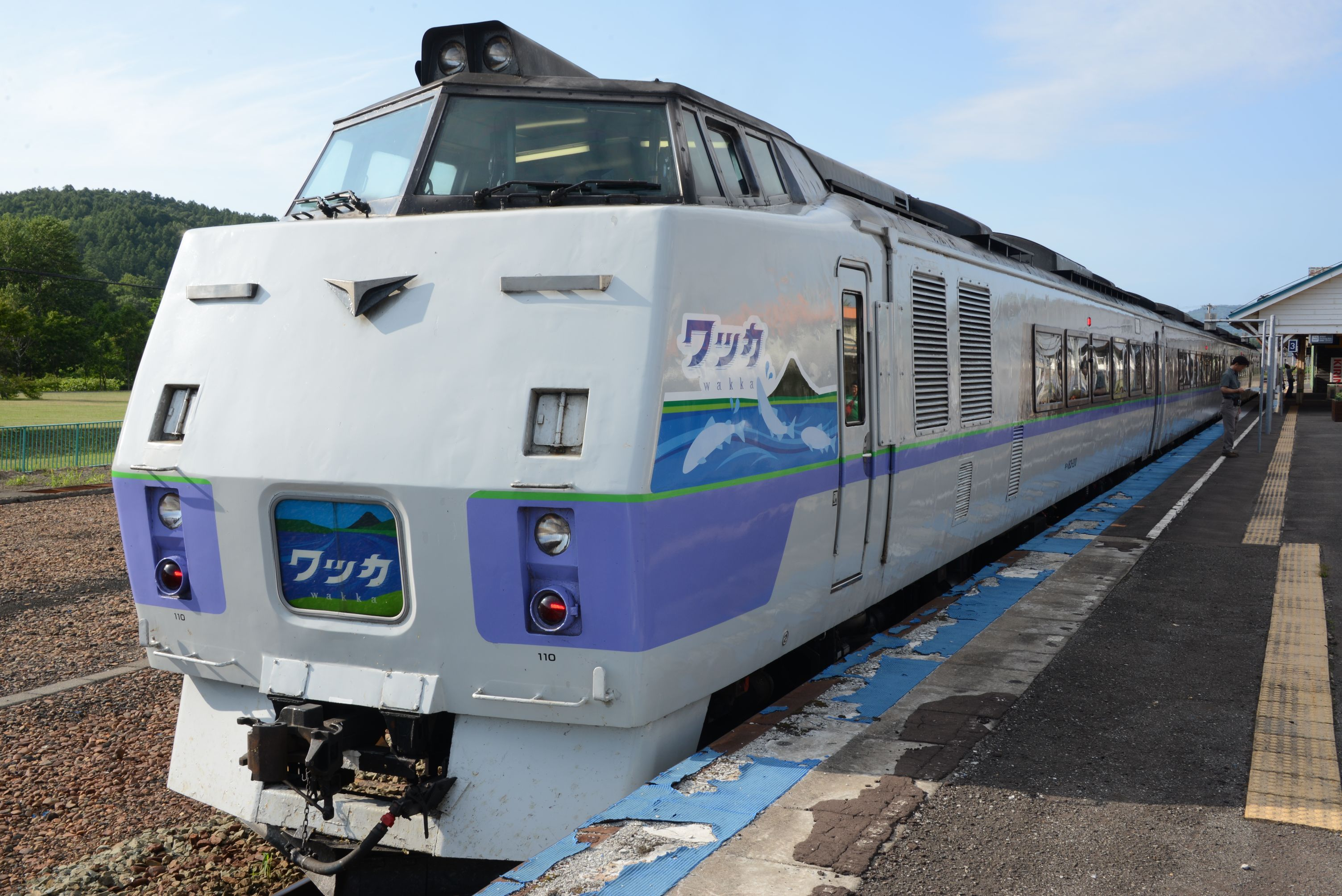 ワッカ号（倶知安駅）